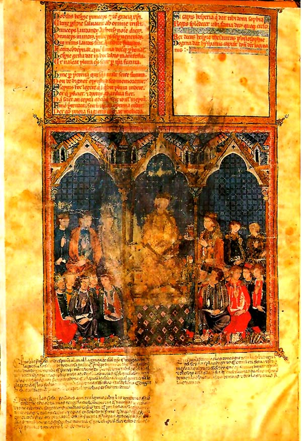 Folleto de un manuscrito de la Estoria de España del rey Alfonso X de Castilla - Feuillet d'un manuscrit de la Estoria de España d'Alphonse X de Castille